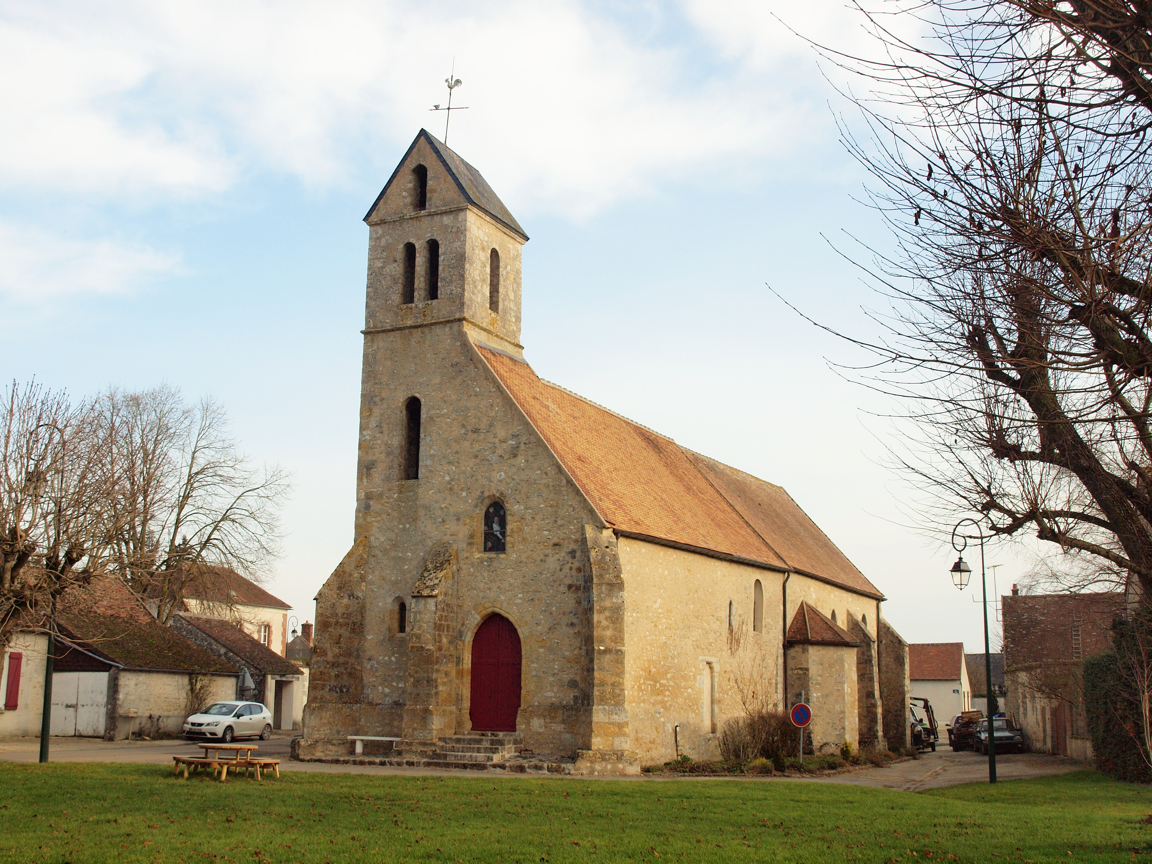 Gironville (Seine-et-Marne, France)